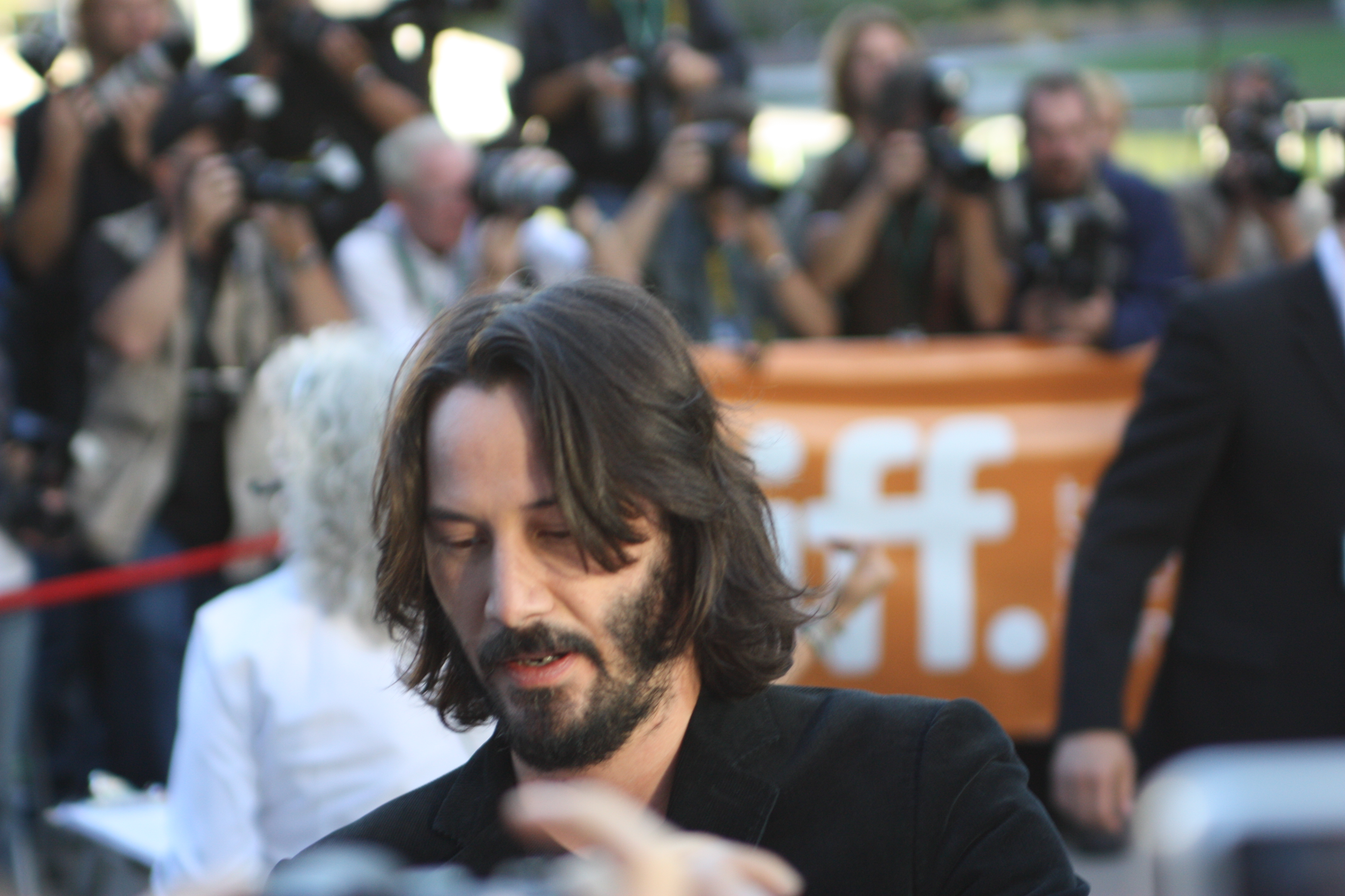 Keanu Reeves - TIFF 09